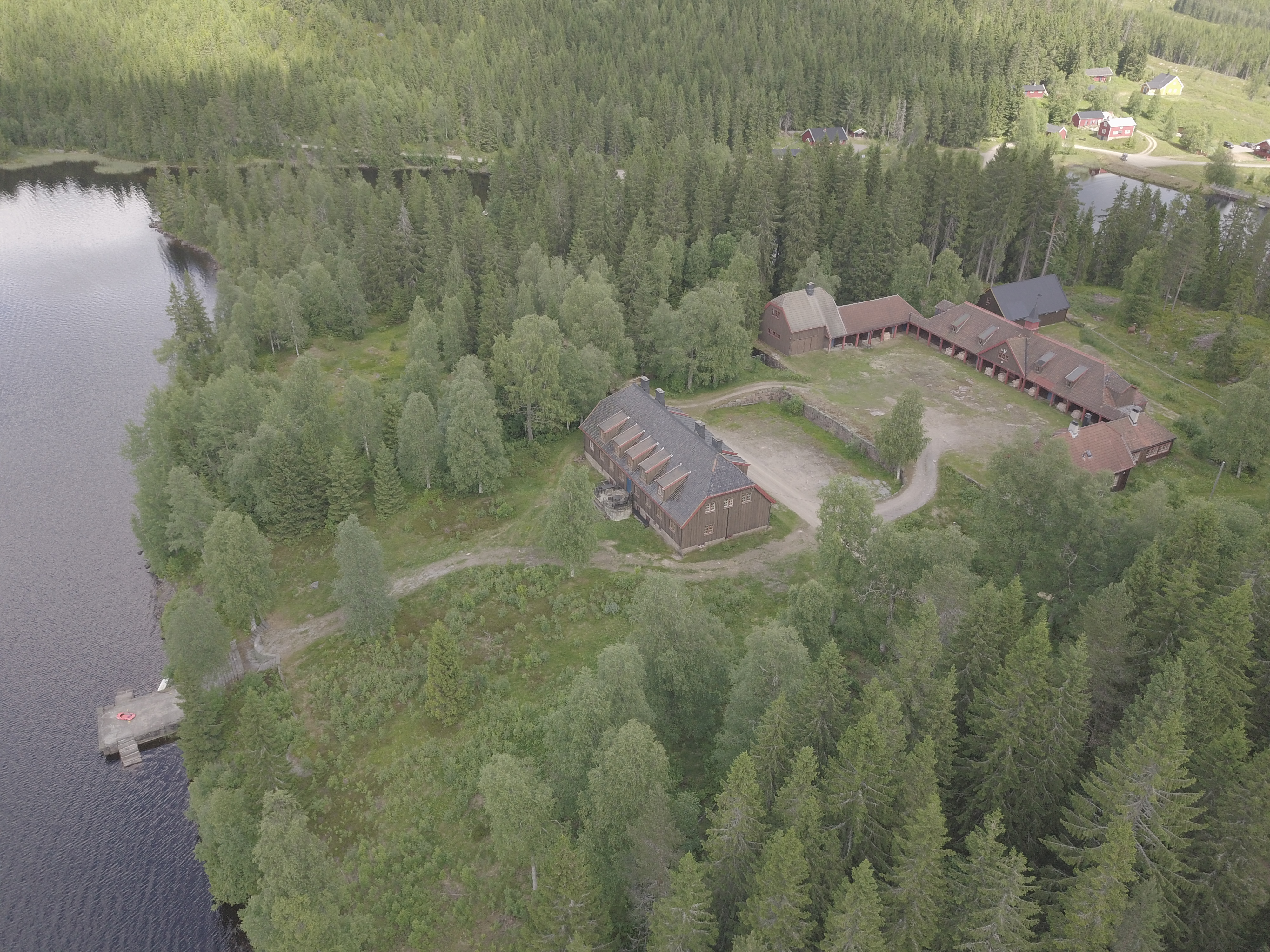 Råsjøen i Romeriksåsen